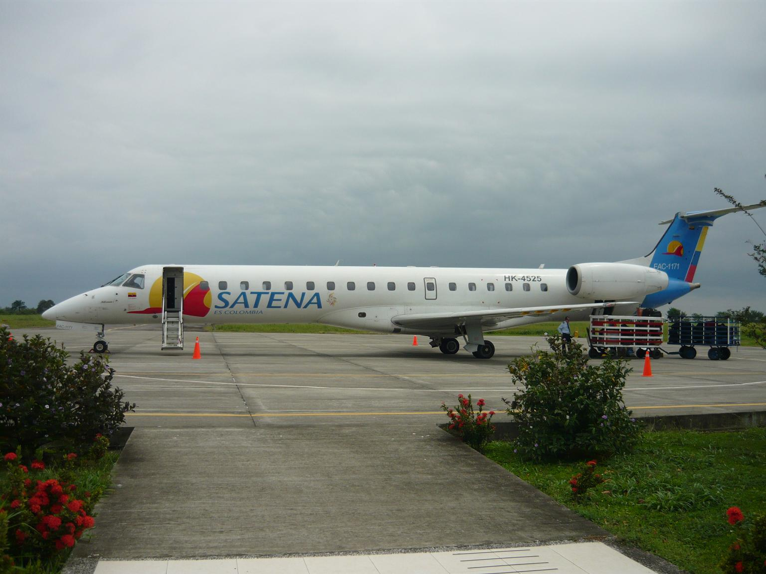 Avion Embraer ERJ 145 en el aeropuerto La Florida de Tumaco